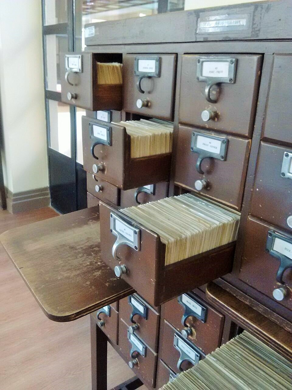 Ficheros bibliográficos de la Biblioteca Nacional ubicados en la Sala Daniel Samper Ortega